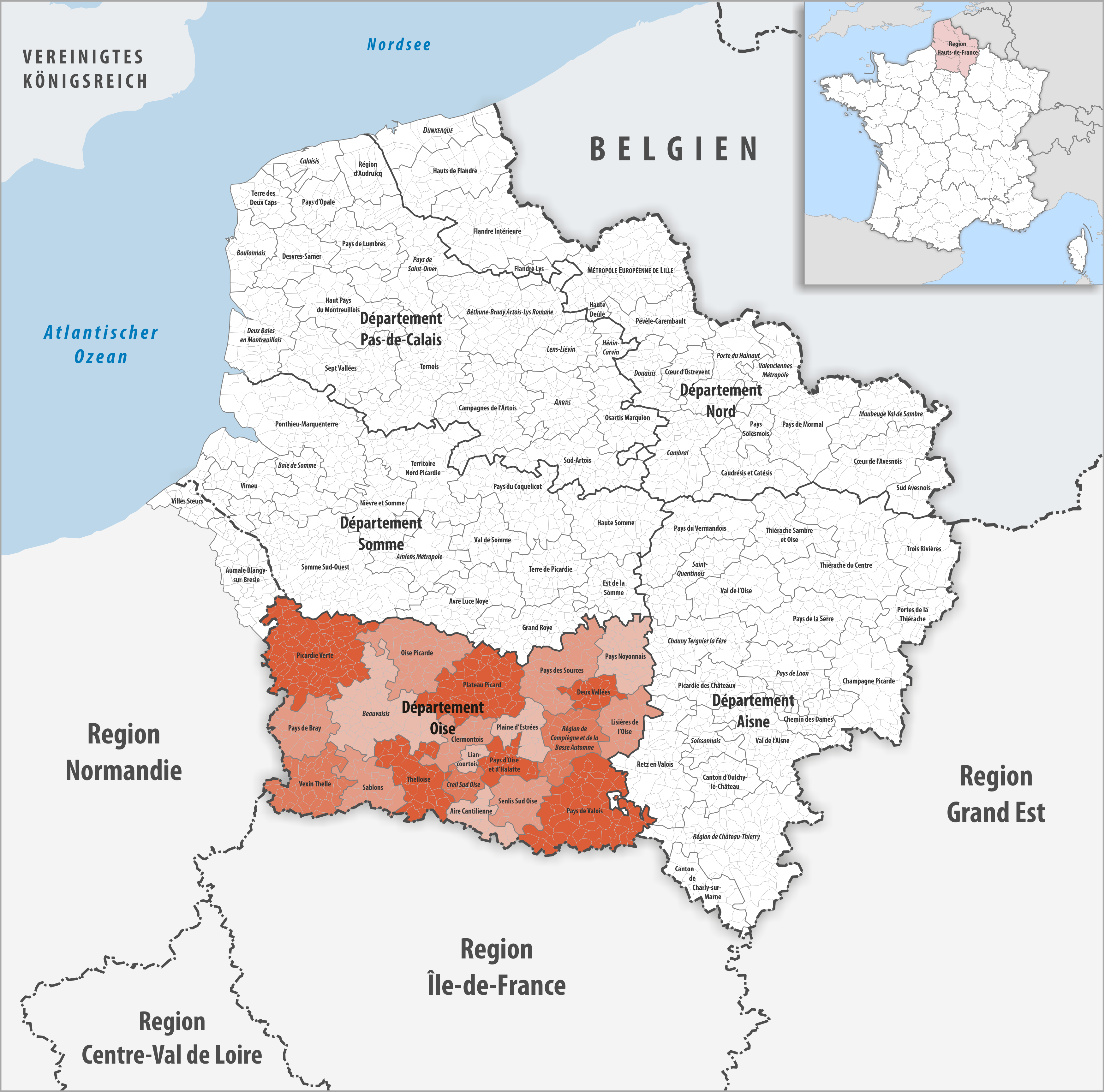 Gemeindeverbände im Département Oise